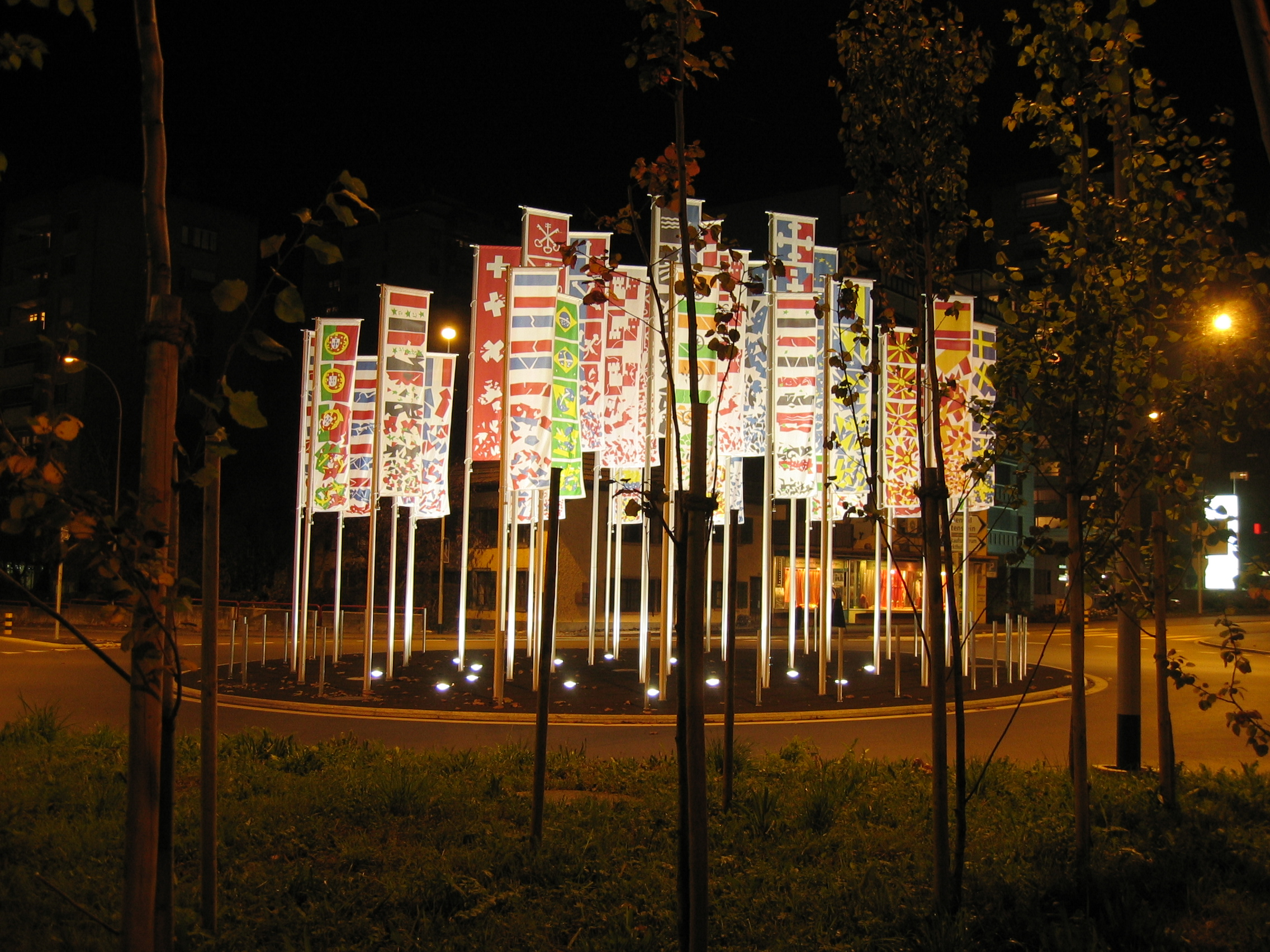 Der neue Kreisel Landstrasse/Hertensteinstrasse. Wurde für eine selbständige Vertiefungsarbeit über das Thema Lichtverschmutzung fotografiert.